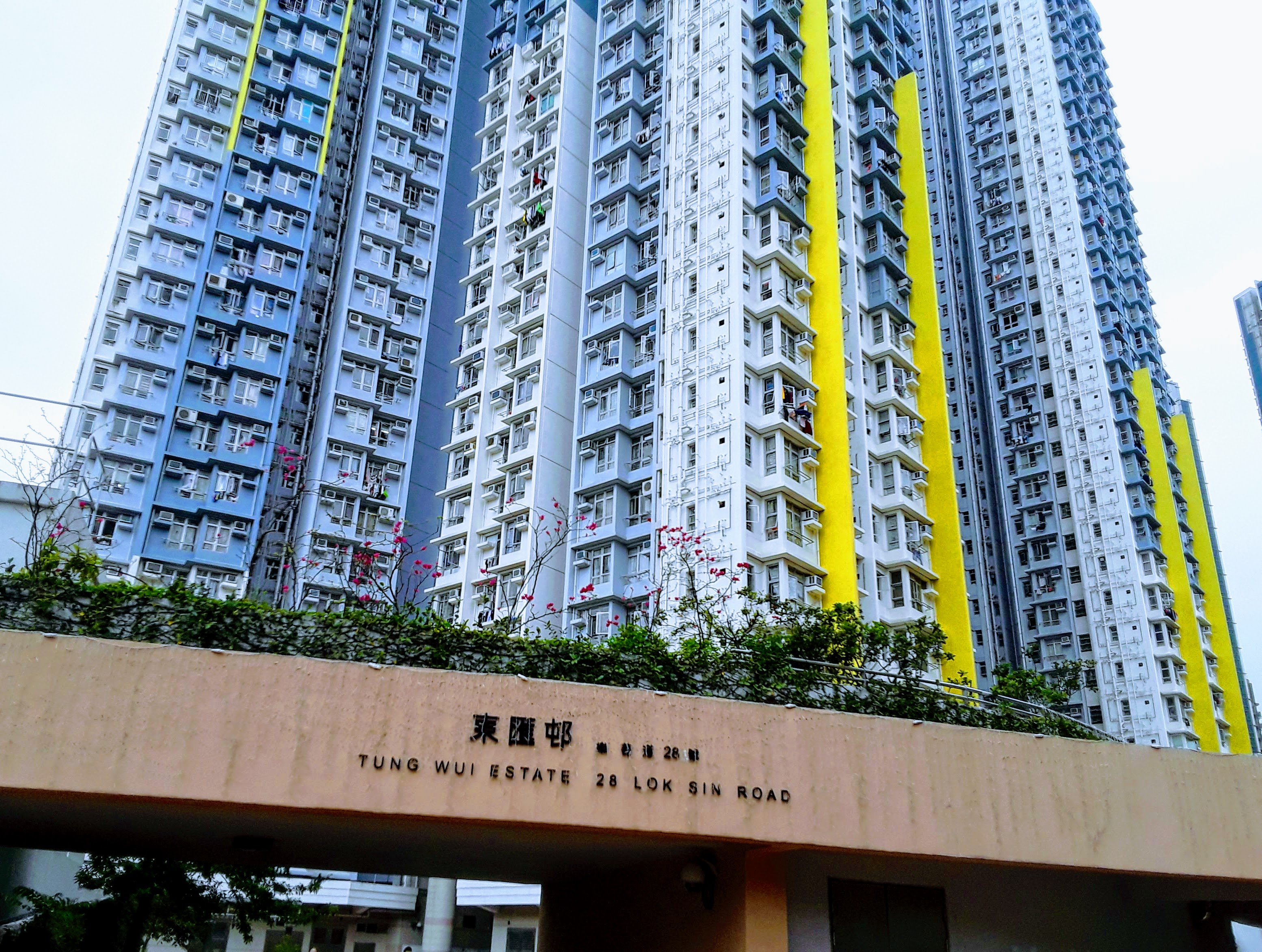 位於東匯邨匯仁樓與匯心樓對出位置